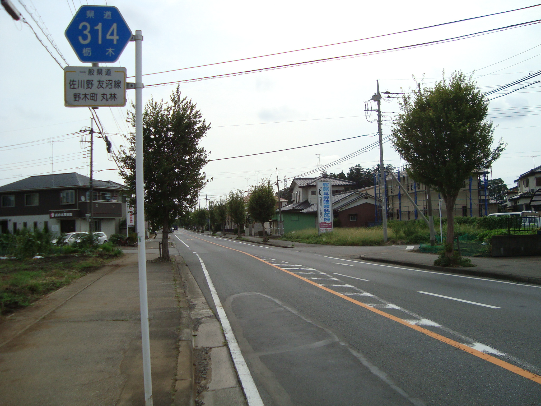 栃木県道314号佐川野友沼線 栃木県下都賀郡野木町丸林付近